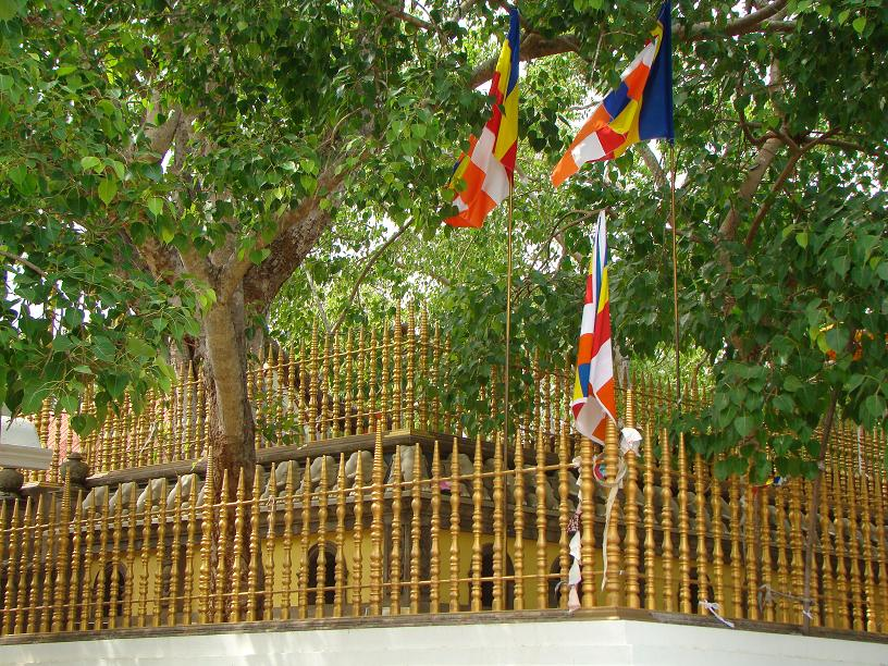 Sri Maha Bodiya, Gold gate